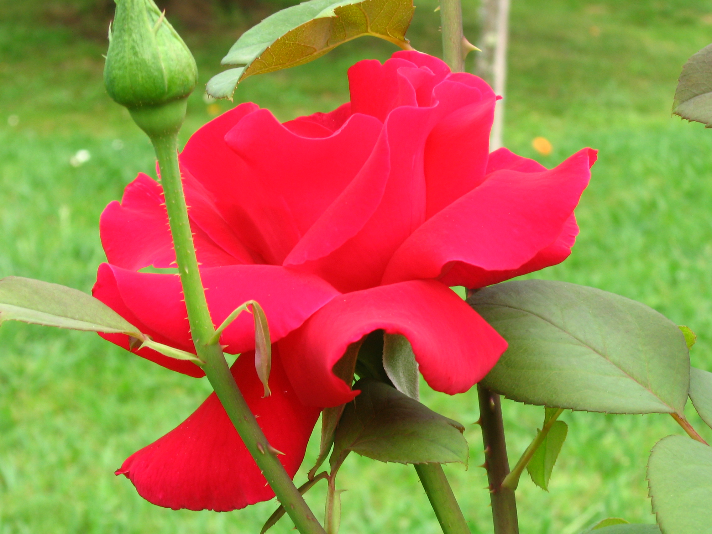 Rosa encarnada em Castrelos, Vigo